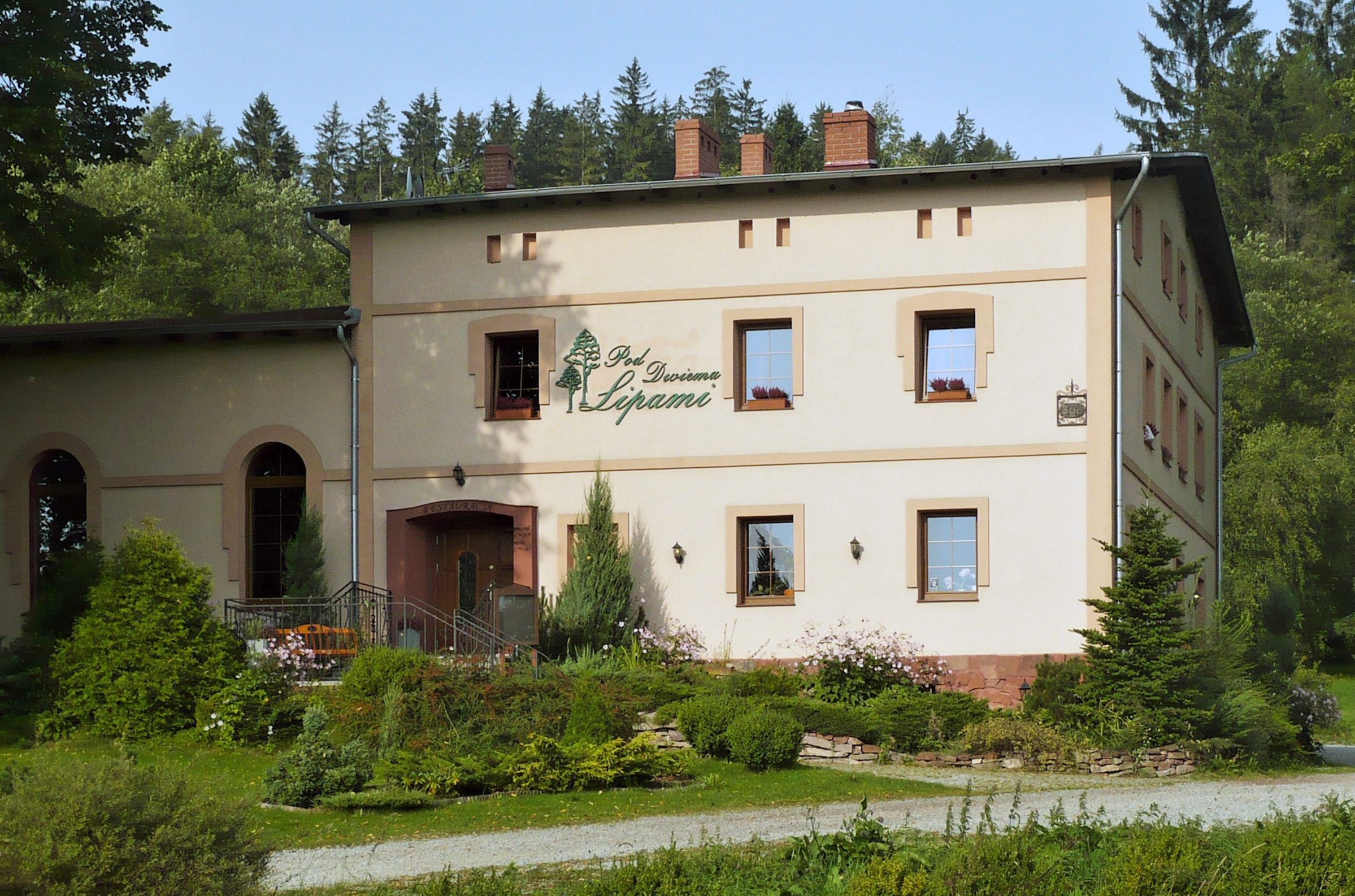 Bartnica. Pod Dwiema Lipami